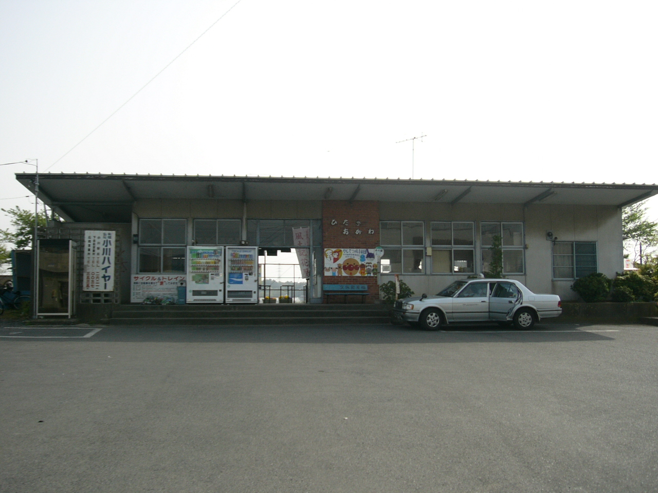 Hitachiogawa Station